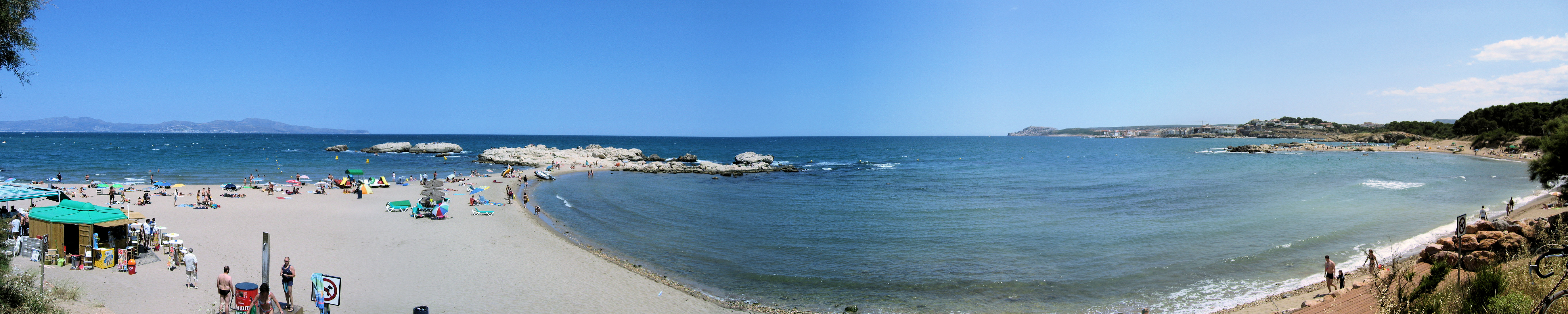 Vista panoràmica de la platja d'Empúries, l'Empordà, Catalunya.